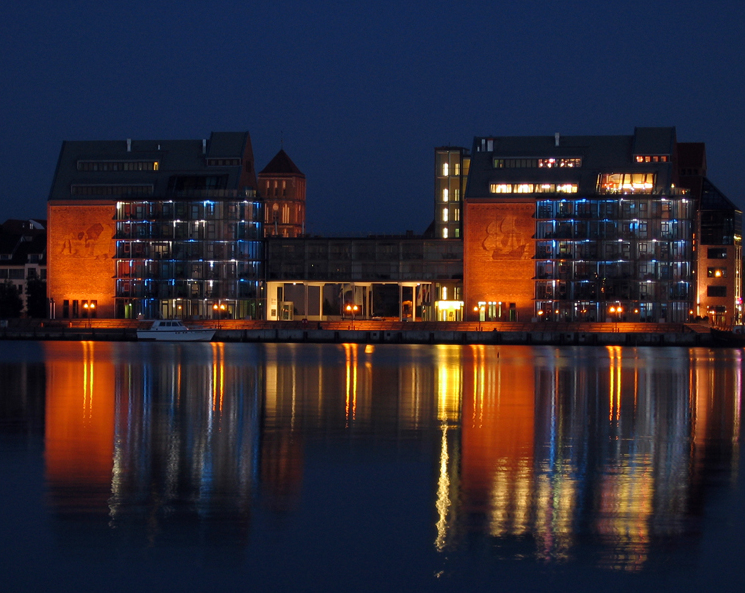 Rostocker Speichergebäude